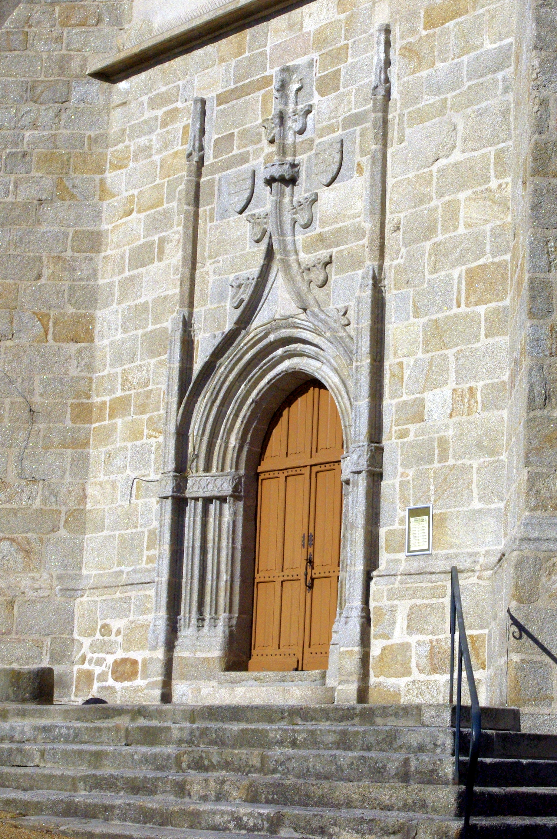 Saint Mathieu en Haute-Vienne l'église